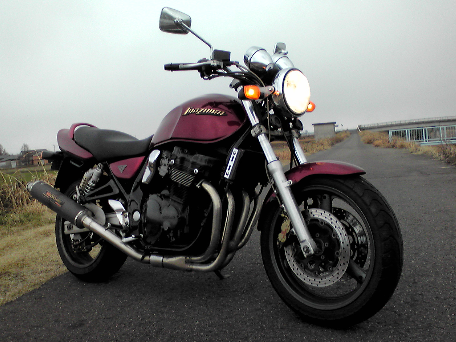 INAZUMA400